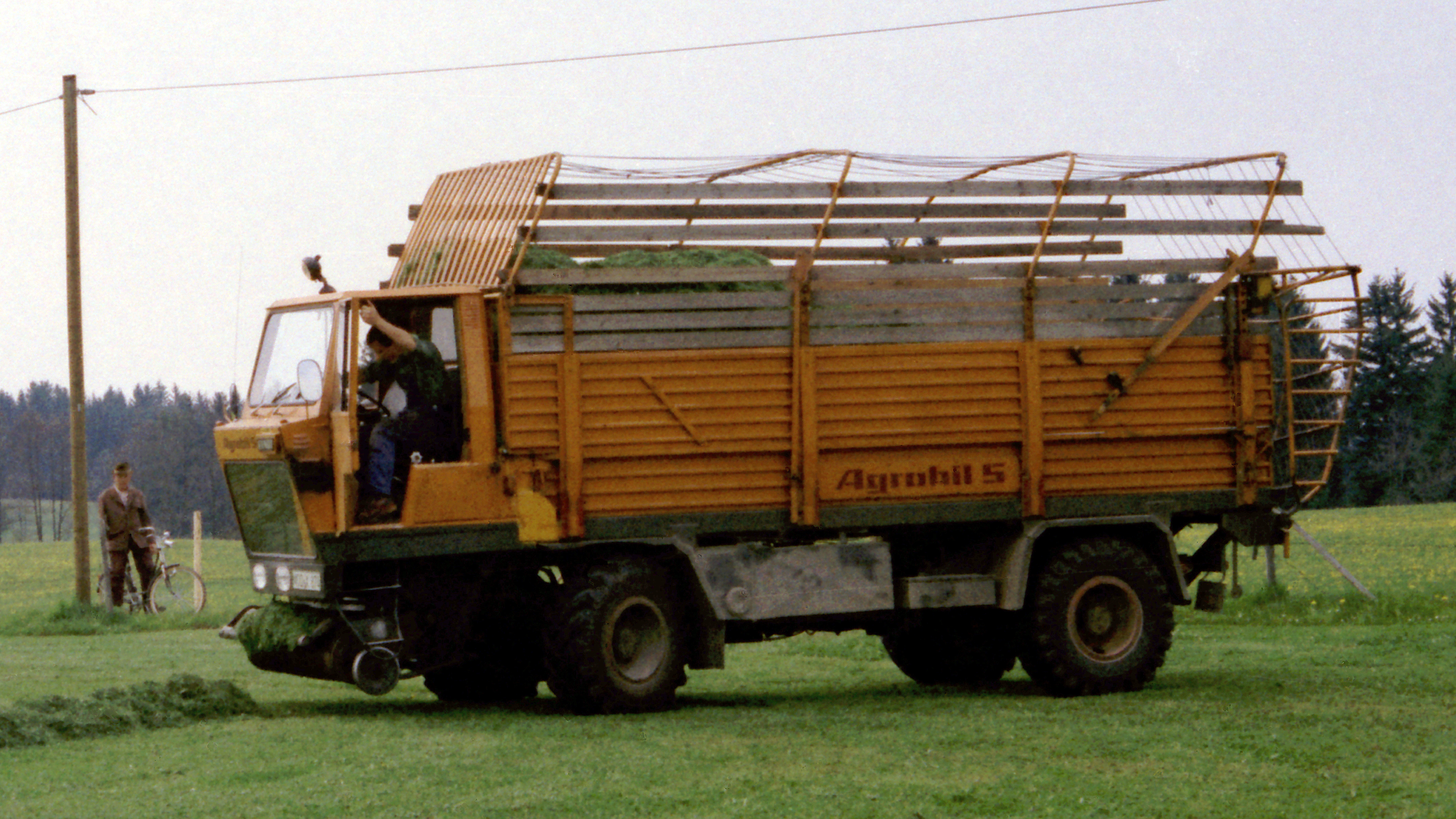 Fendt Agrobil S im Oktober 1989